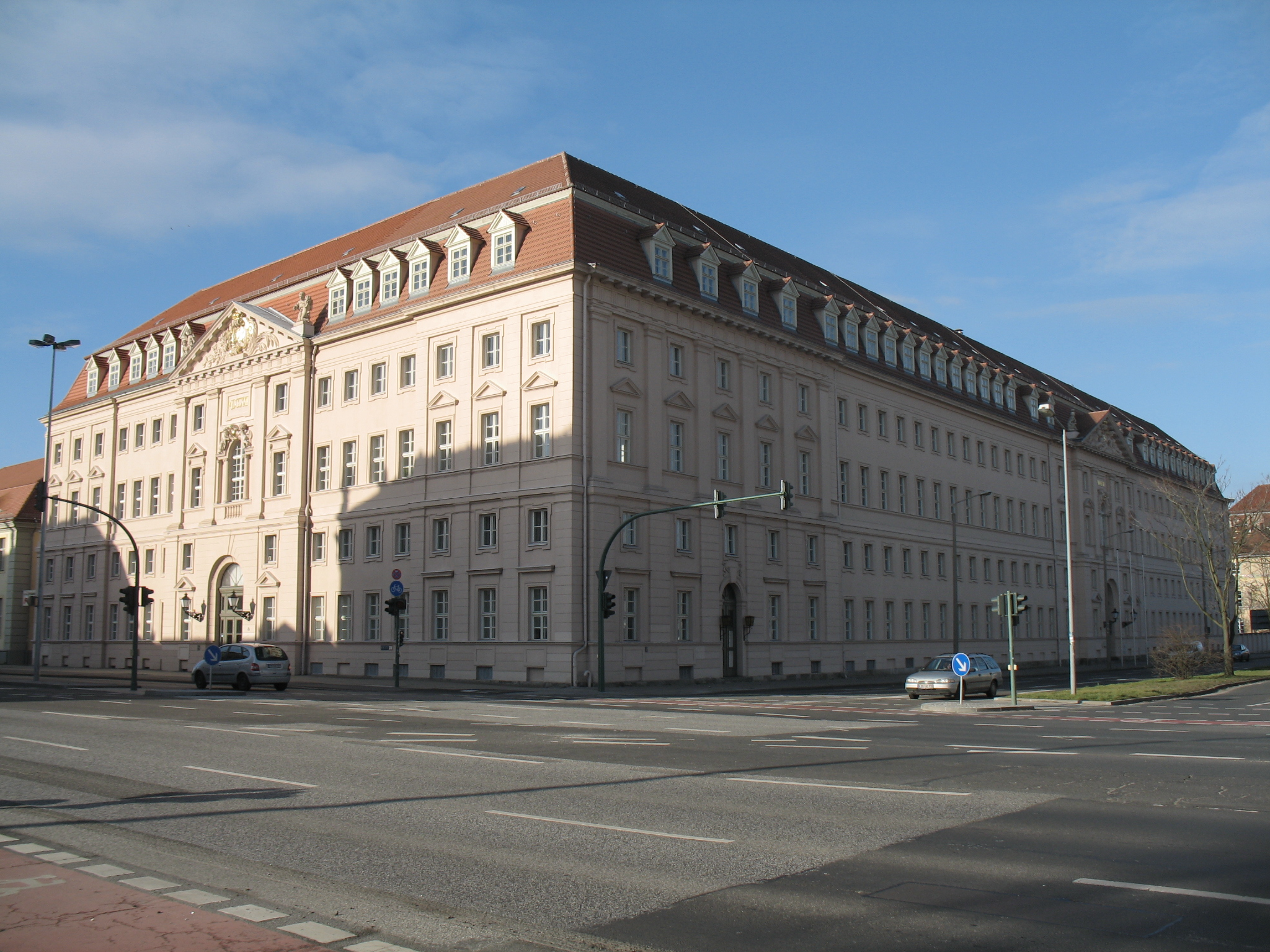 Das Große Militärwaisenhaus über die Kreuzung Breite Str./Dortustr. hinweg gesehen Urheber: Florian S.